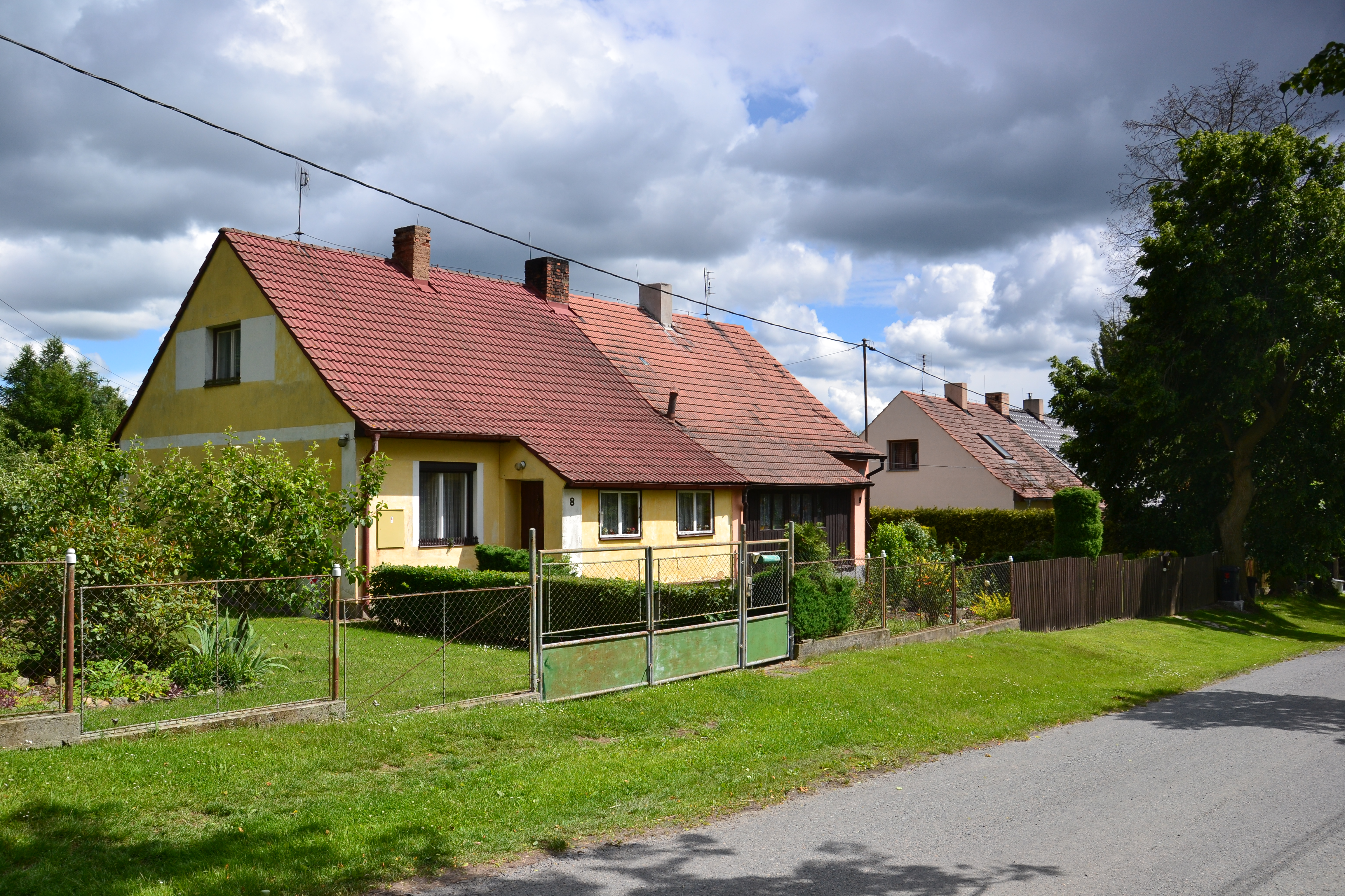 Dům čp. 8